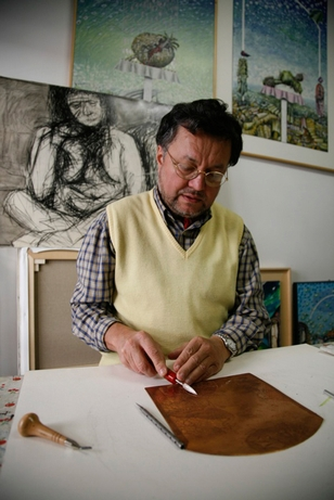 Immagine persona Carlo